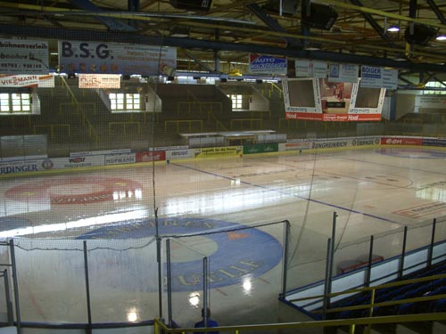 Eisstadtion am Gutenbergweg in Landshut Halle 1